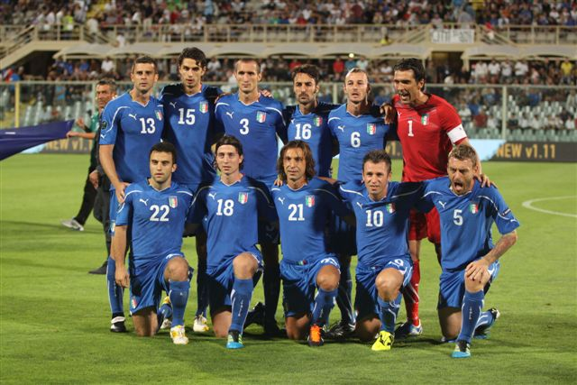 L'11 di Prandelli alla partita di qualificazione per gli Europei 2012.